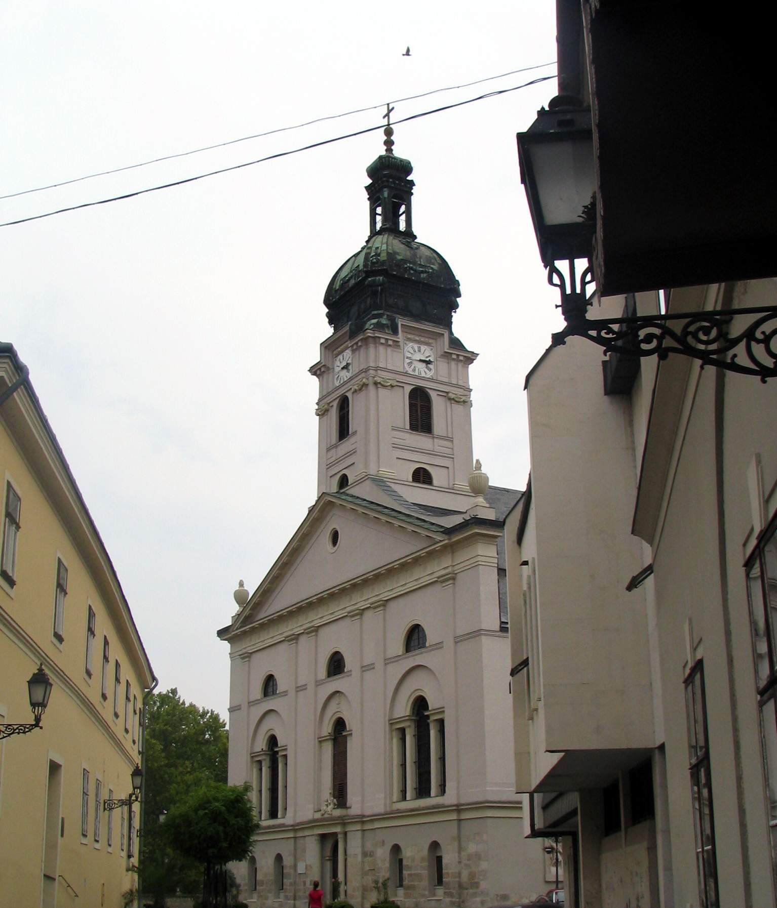 Gyor_Cathedral